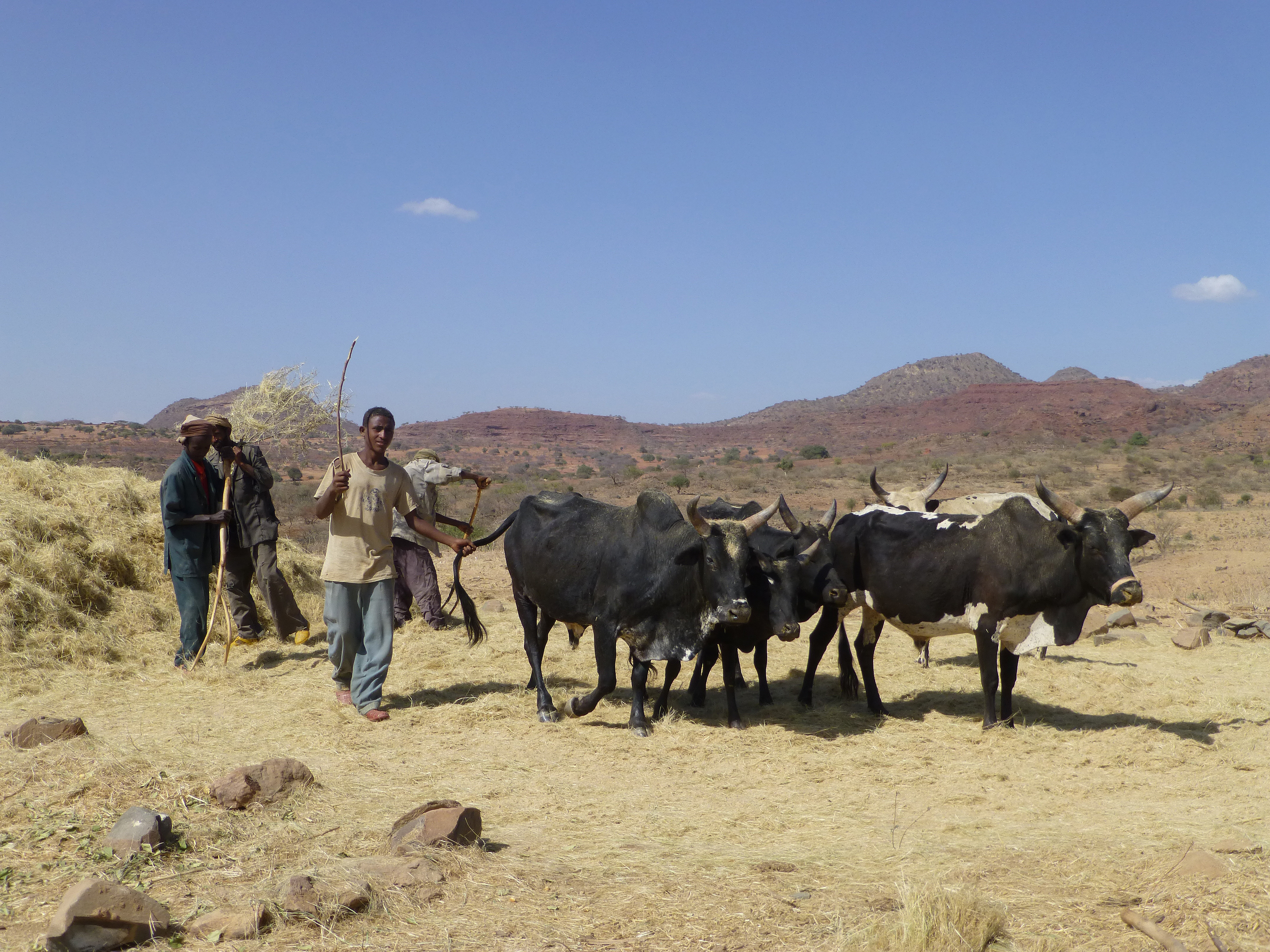 Ethiopie, région Tigray, près de Samre, au sud de Mékélé : battage du teff (Eragrostis tef)